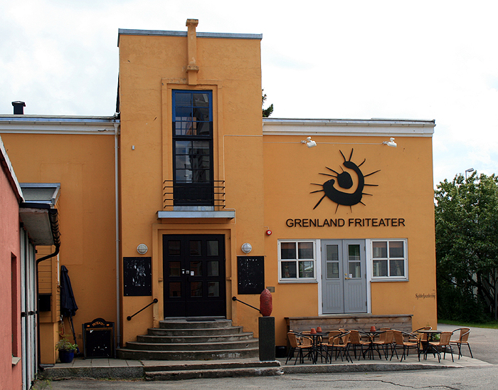 Grenland friteater, Porsgrunn.